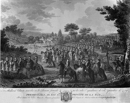 Grabado de temática militar del pintor Asensio Julià (1760-1832)